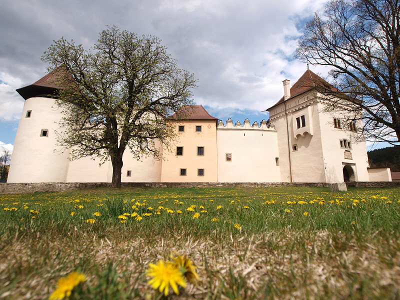 Kežmarok - Kežmarský hrad